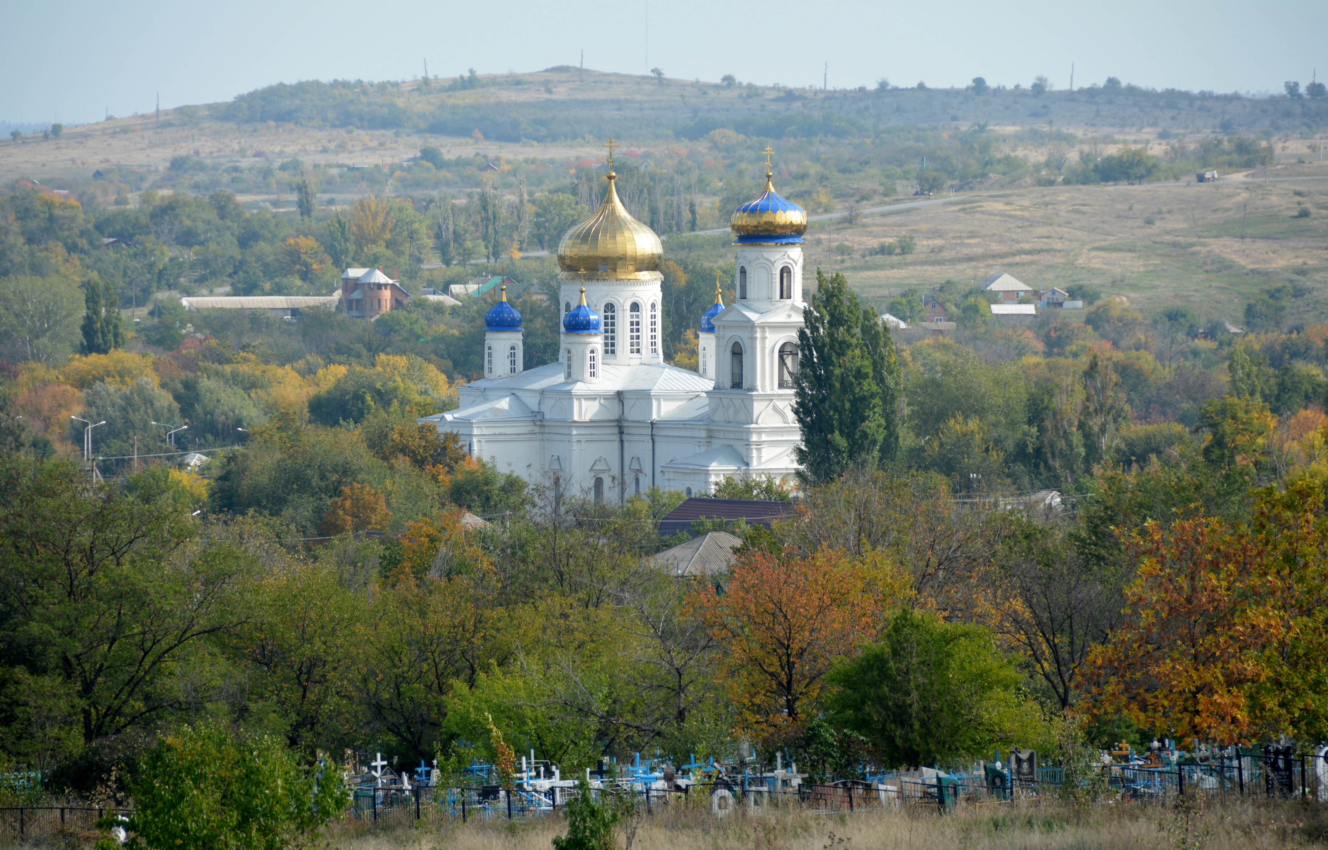 Гундоровка, храм Успения Пресвятой Богородицы, общий вид.